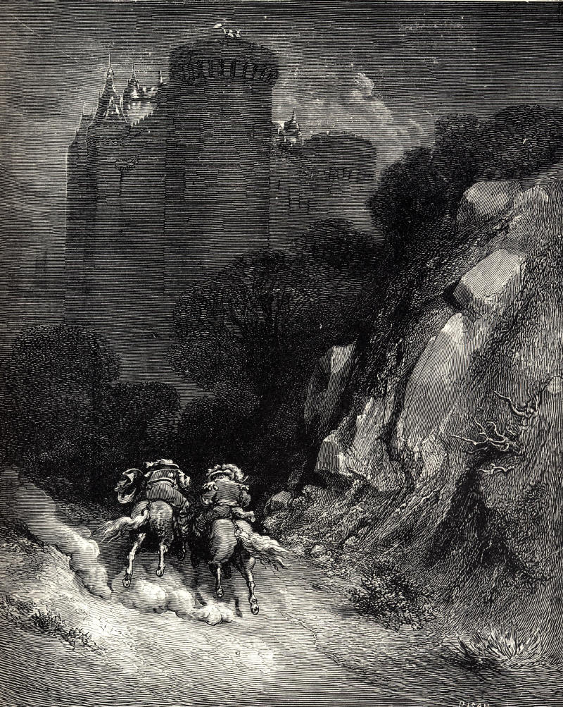 Illustration for Charles Perrault's La Barbe Bleue from Histoires ou Contes du Temps passé: Les Contes de ma Mère l'Oye(1697). Gustave Doré's illustrations appear in an 1867 edition entitled Les Contes de Perrault. Third of four engravings